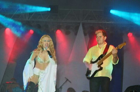 Joelma e Chimbinha em apresentação em Brasília (outubro de 2003).